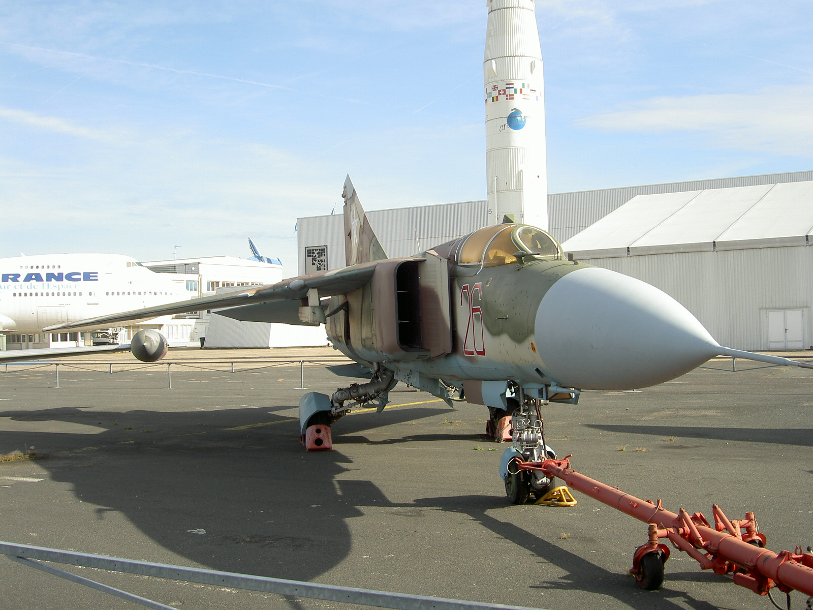 Mikoyan-Gurevich 23 ML "Fogger"G n° 26